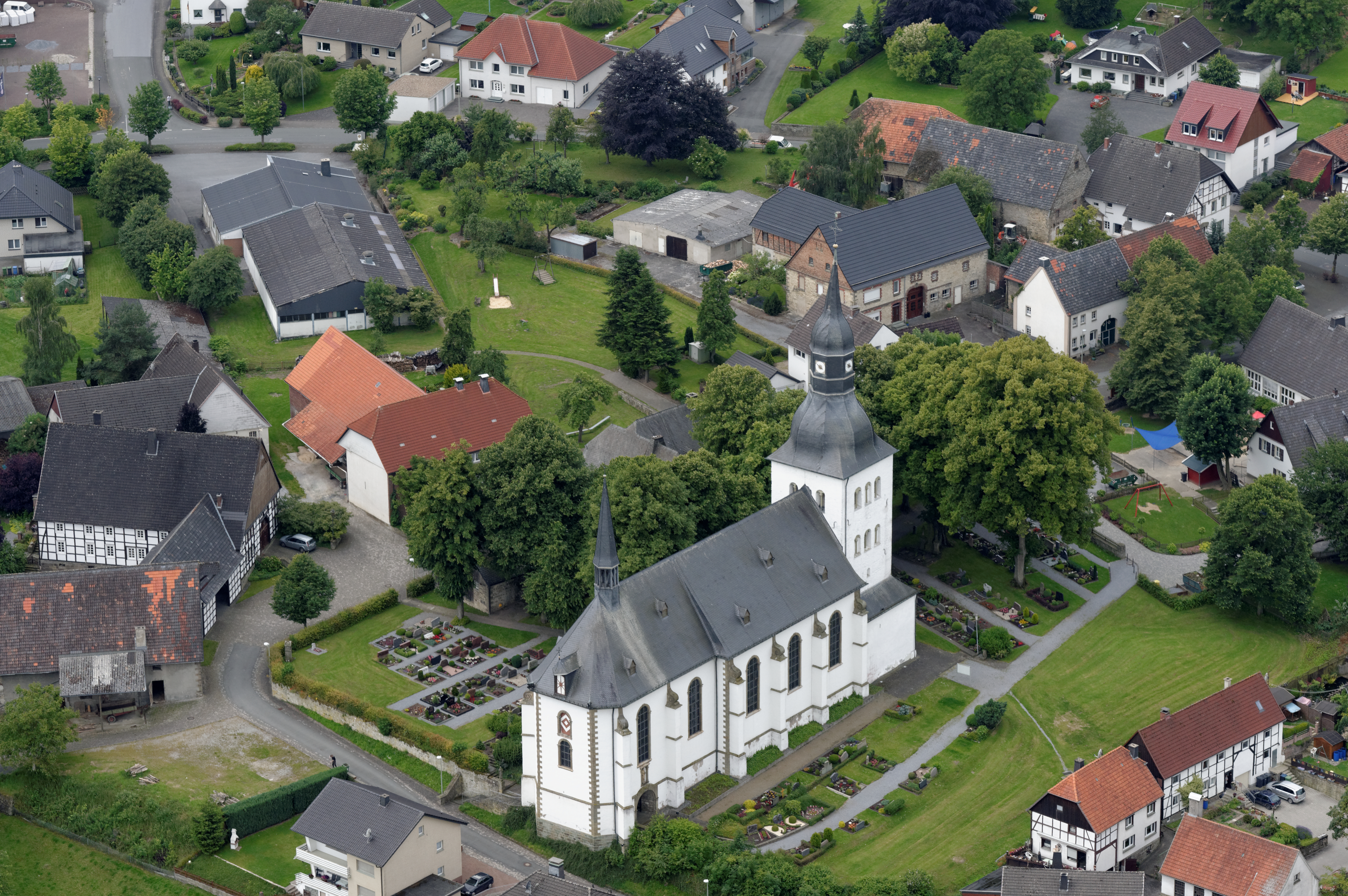 Fotoflug Sauerland Nord. Rüthen-Altenrüthen: St. Gervasius und St. Protasius The making of this document was supported by the Community-Budget of Wikimedia Germany.